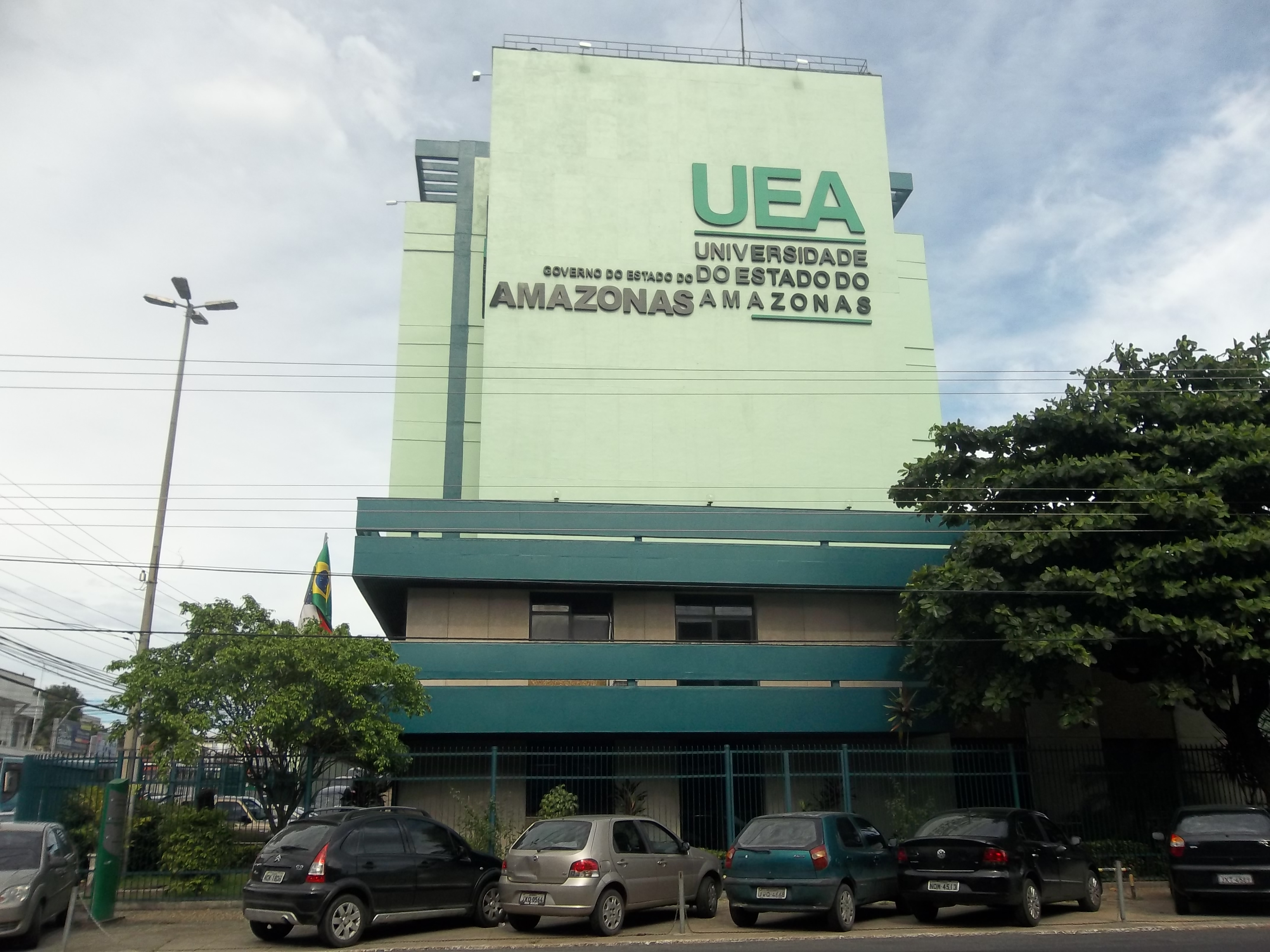 Prédio de uma das unidades da Universidade do Estado do Amazonas (UEA), no centro Manaus - AM.